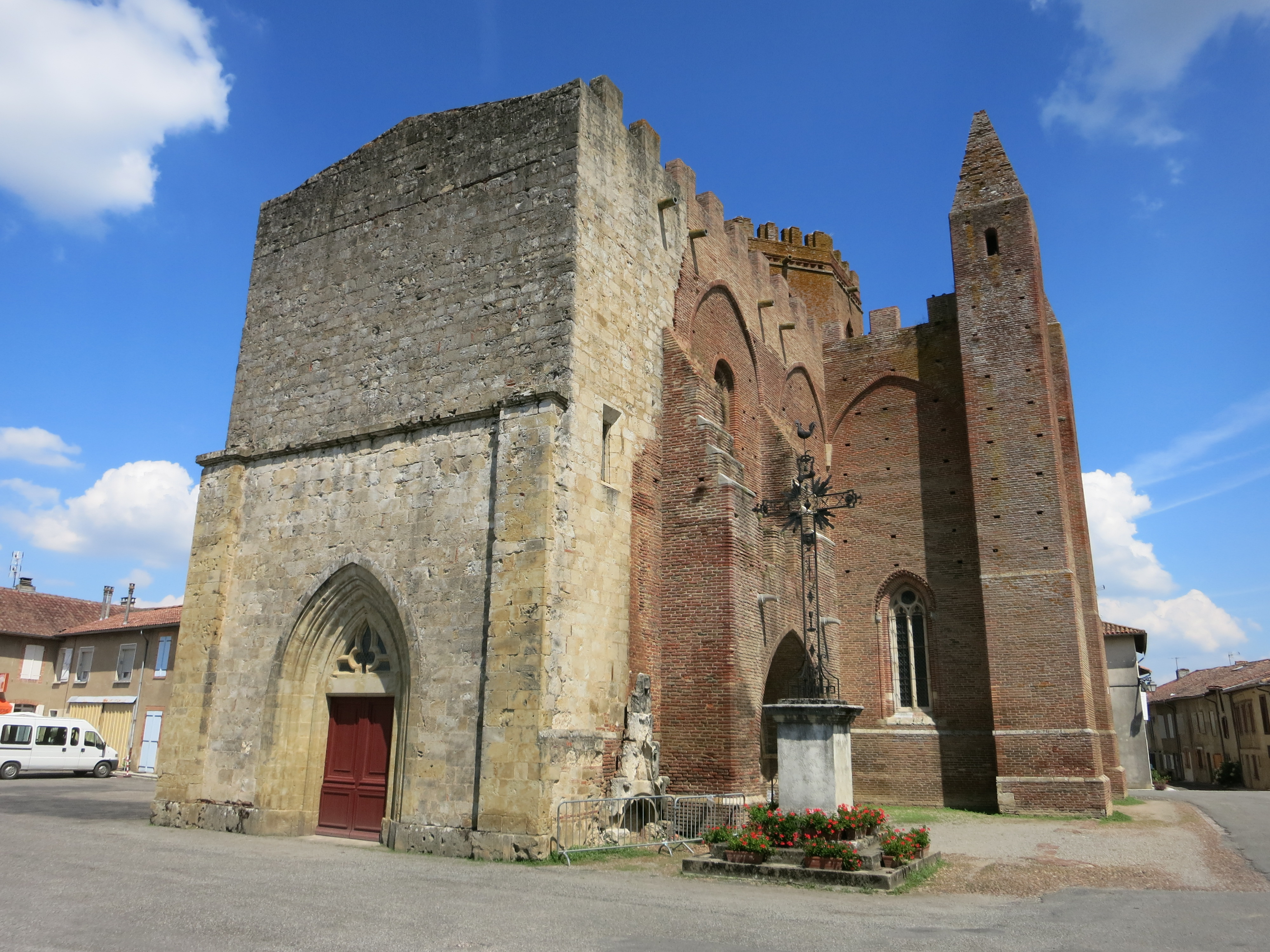 L'église de Simorre